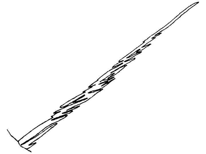 Unterteillung einer Bainitnadel in Untereinheiten